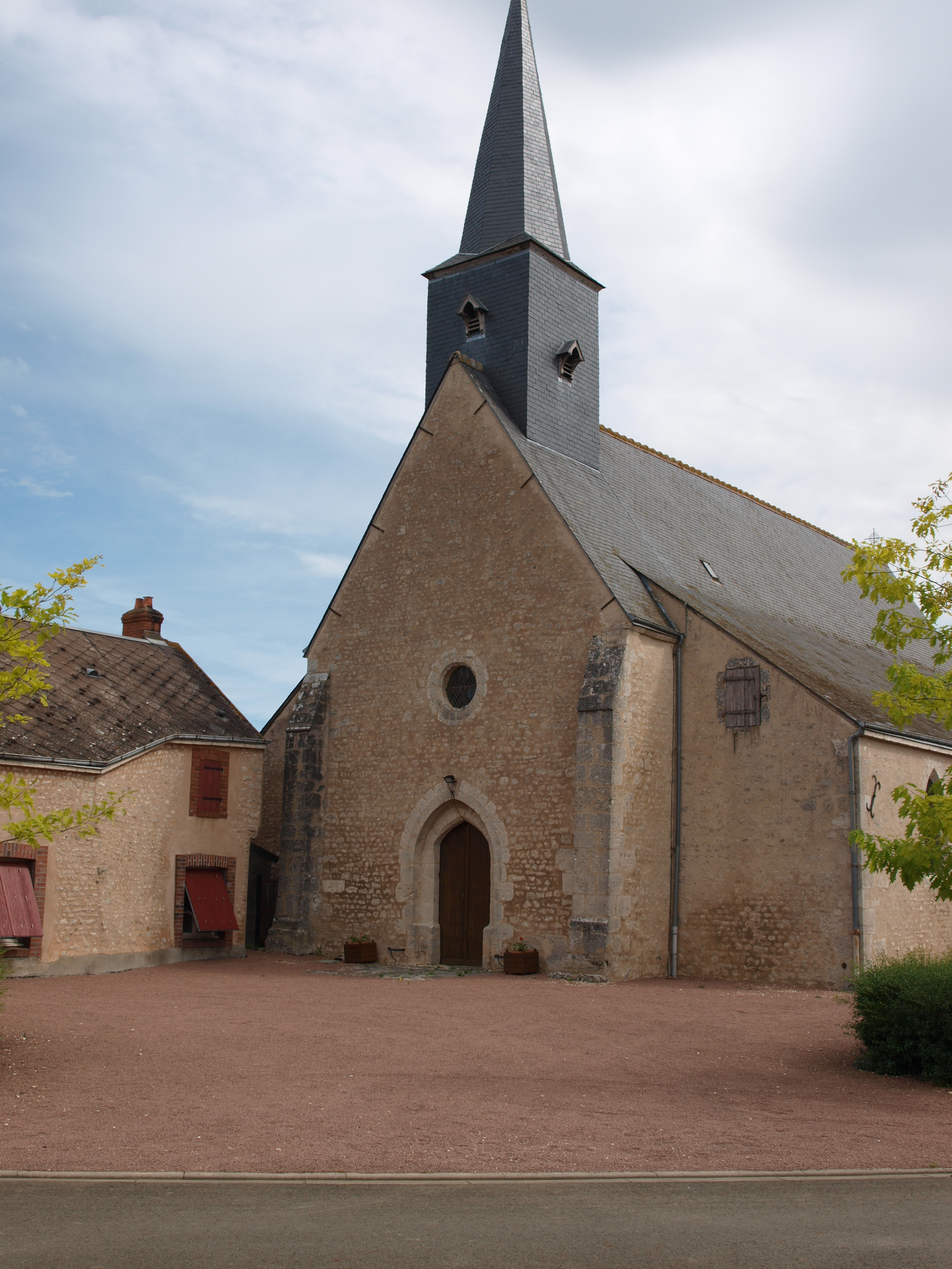 Eglise de Prénouvellon